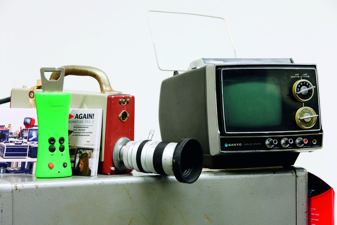 Impression des ZKM Labors